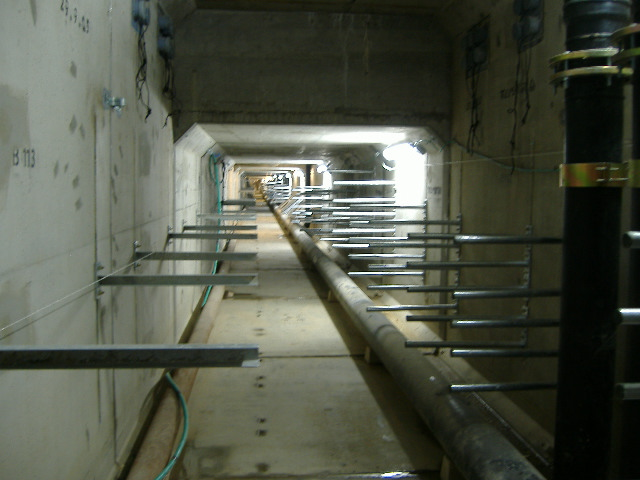 מנהרת תשתיות, רח' העצמאות. חיפה.